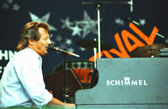 Konstantin Wecker, Konzert 1987 (in Garching bei München).